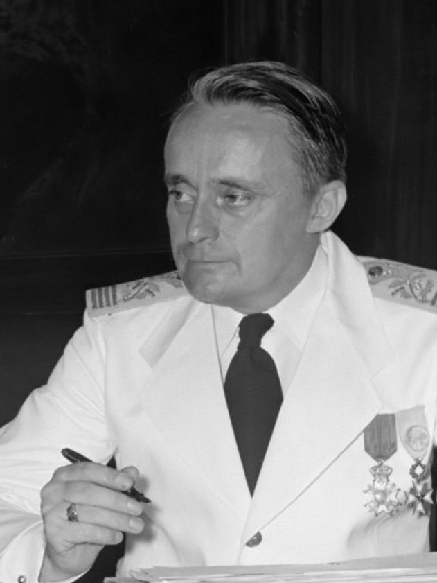 Nederlandse Antillen en Suriname ten tijde van het koninklijk bezoek van koningin Juliana en prins Bernhard in 1955; Gouverneur Klaasesz (rechts) in gesprek met een ambtenaar bij de voorbereiding van het koninklijk bezoek 1 oktober 1955